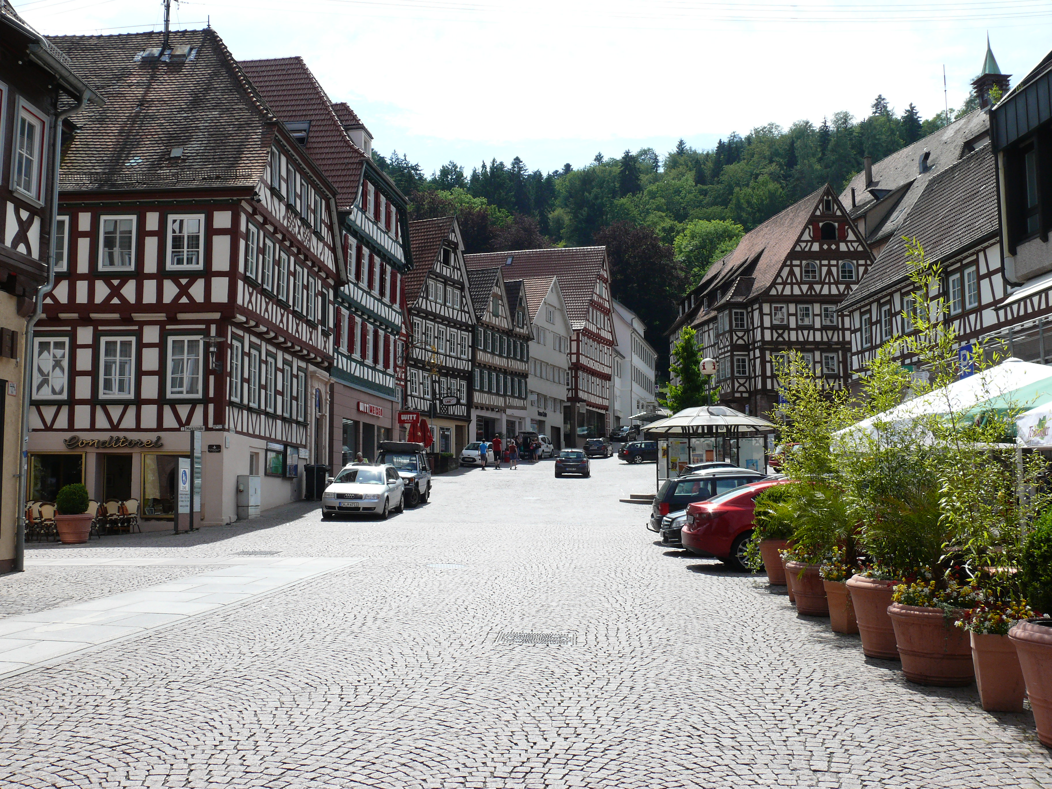 Die "Marktbrücke" in Calw, oben rechts beginnt der Marktplatz.